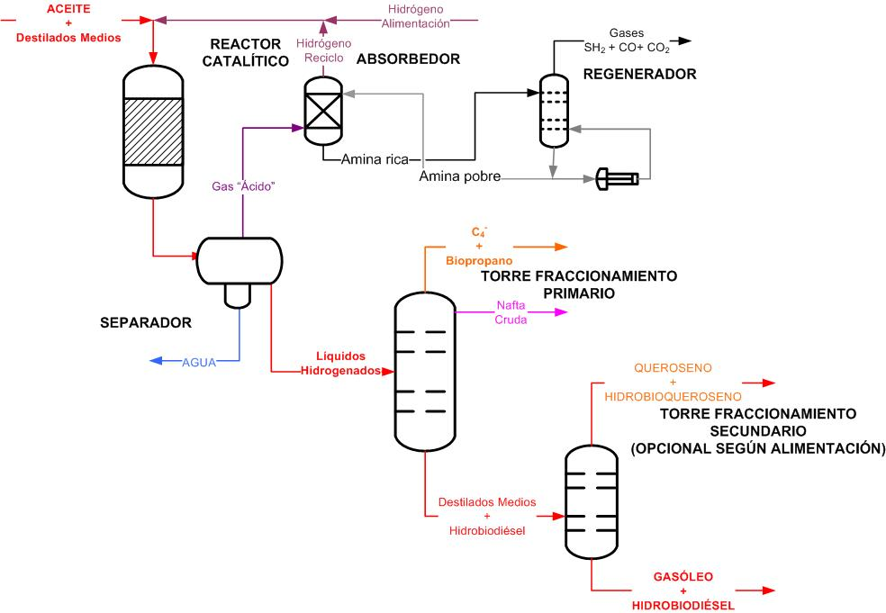 Este esquema se centra en la fabricación en mezcla con gasóleo convencional.